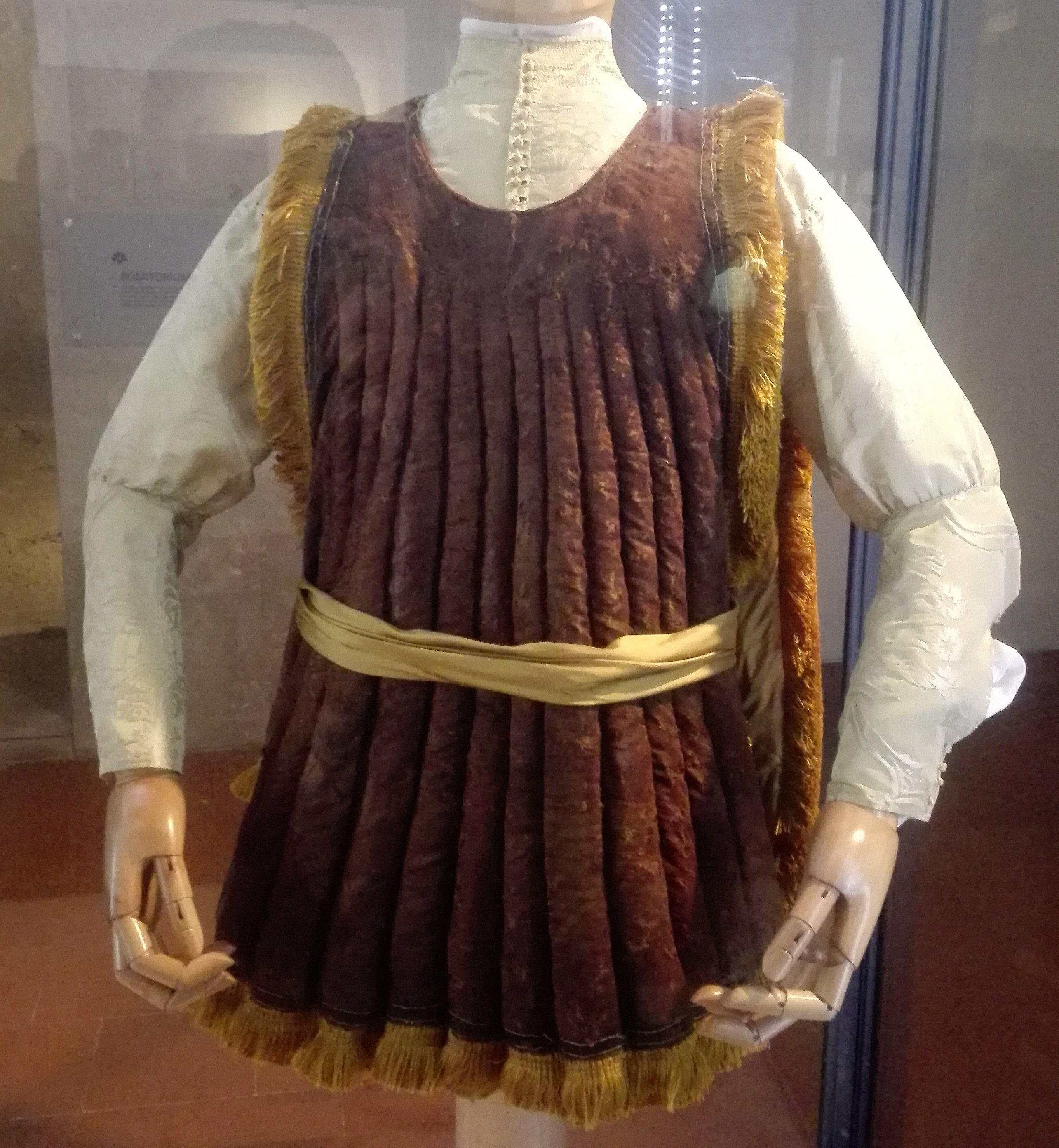 Giornea del XV secolo, dalla sepoltura del Conte Diego I Cavaniglia, conservata nel museo dell'Opera di San Francesco a Folloni a Montella